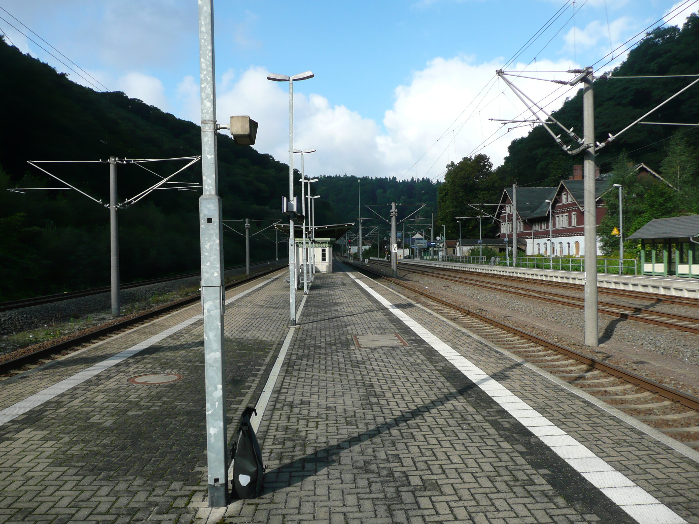 Gleisansicht des Bahnhofes Tharandt